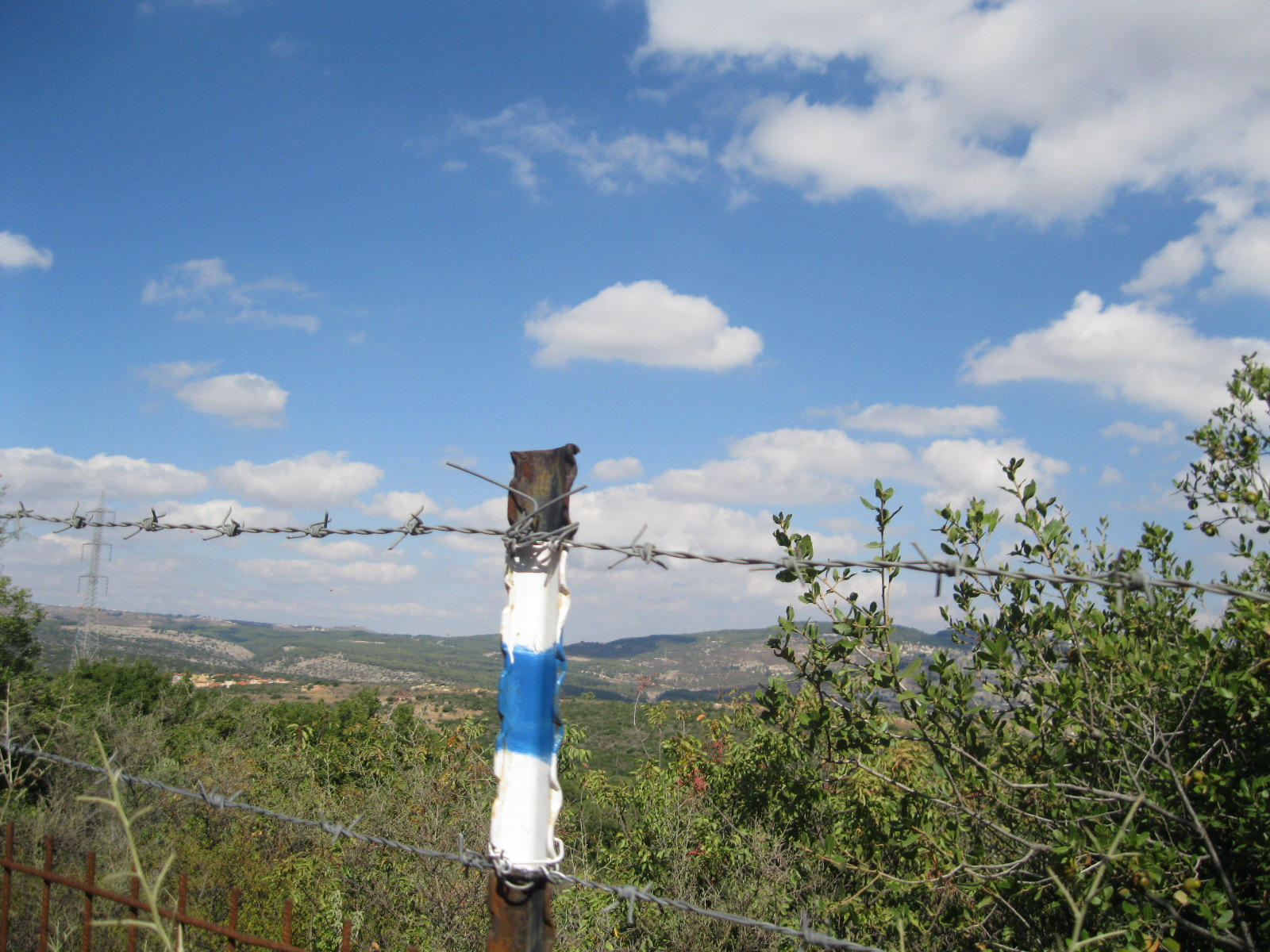 סימון דרך כחול על גדר תיל